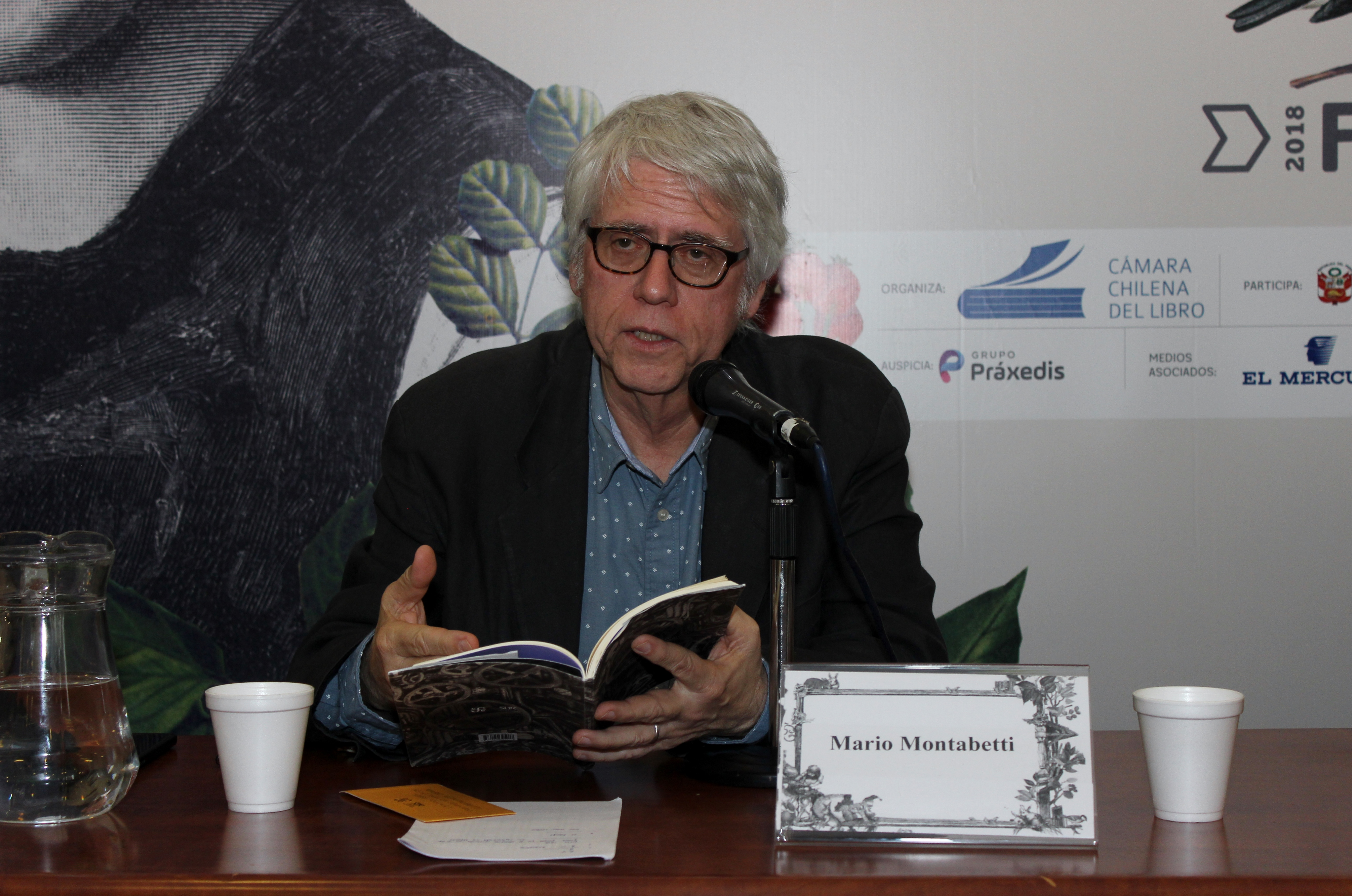 El poeta peruano Mario Montalbetti en la Feria Internacional del Libro de Santiago 2018.